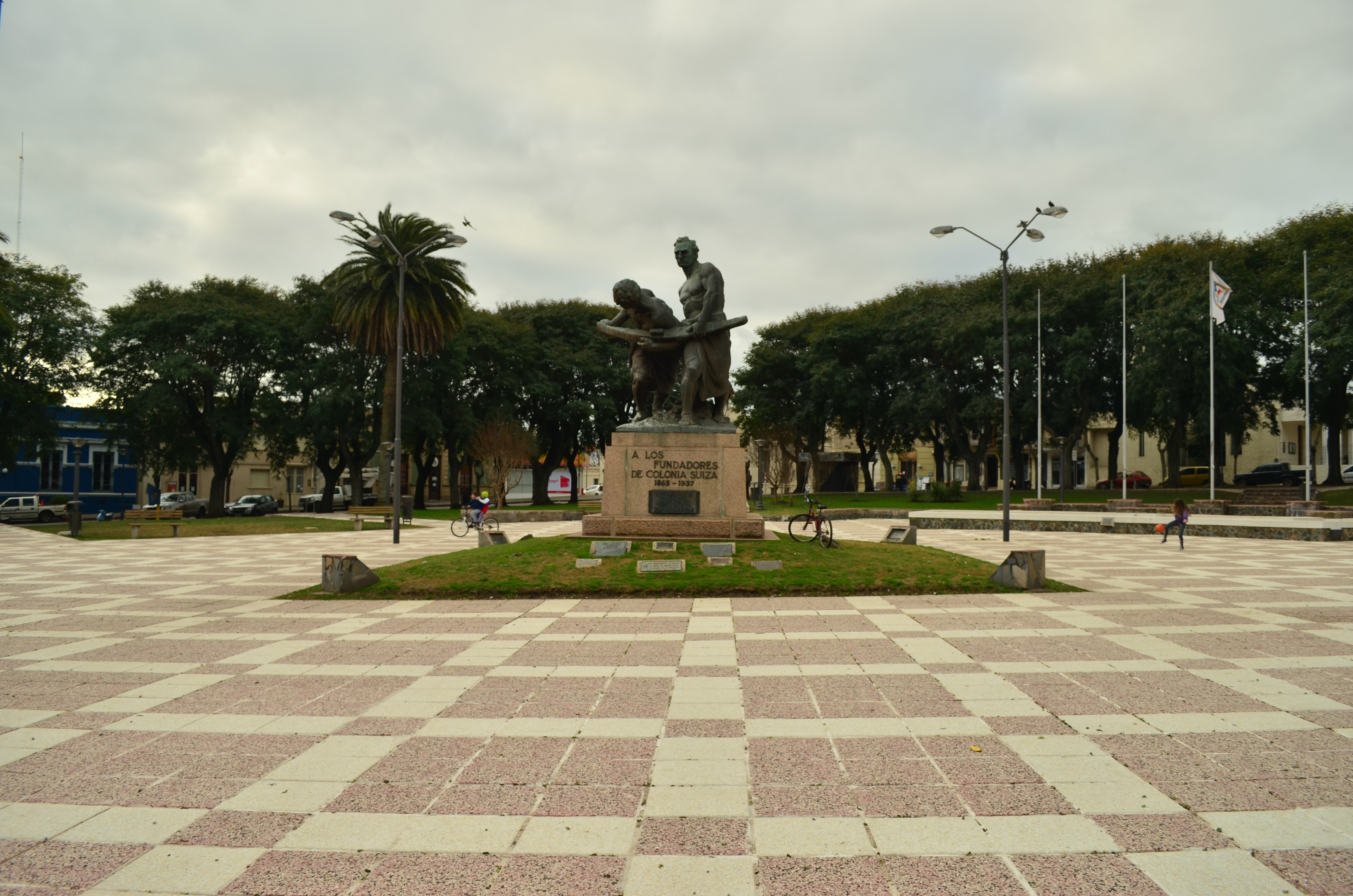 Plaza de los Fundadores. Ubicada en el departamento de Colonia